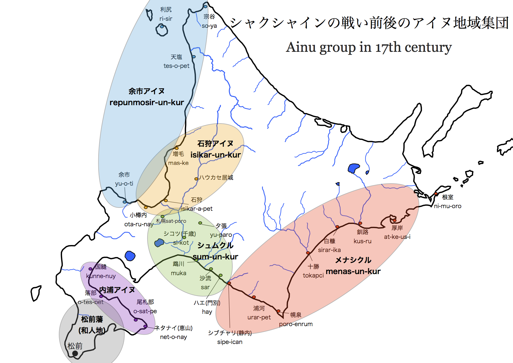 17世紀アイヌ民族の地図